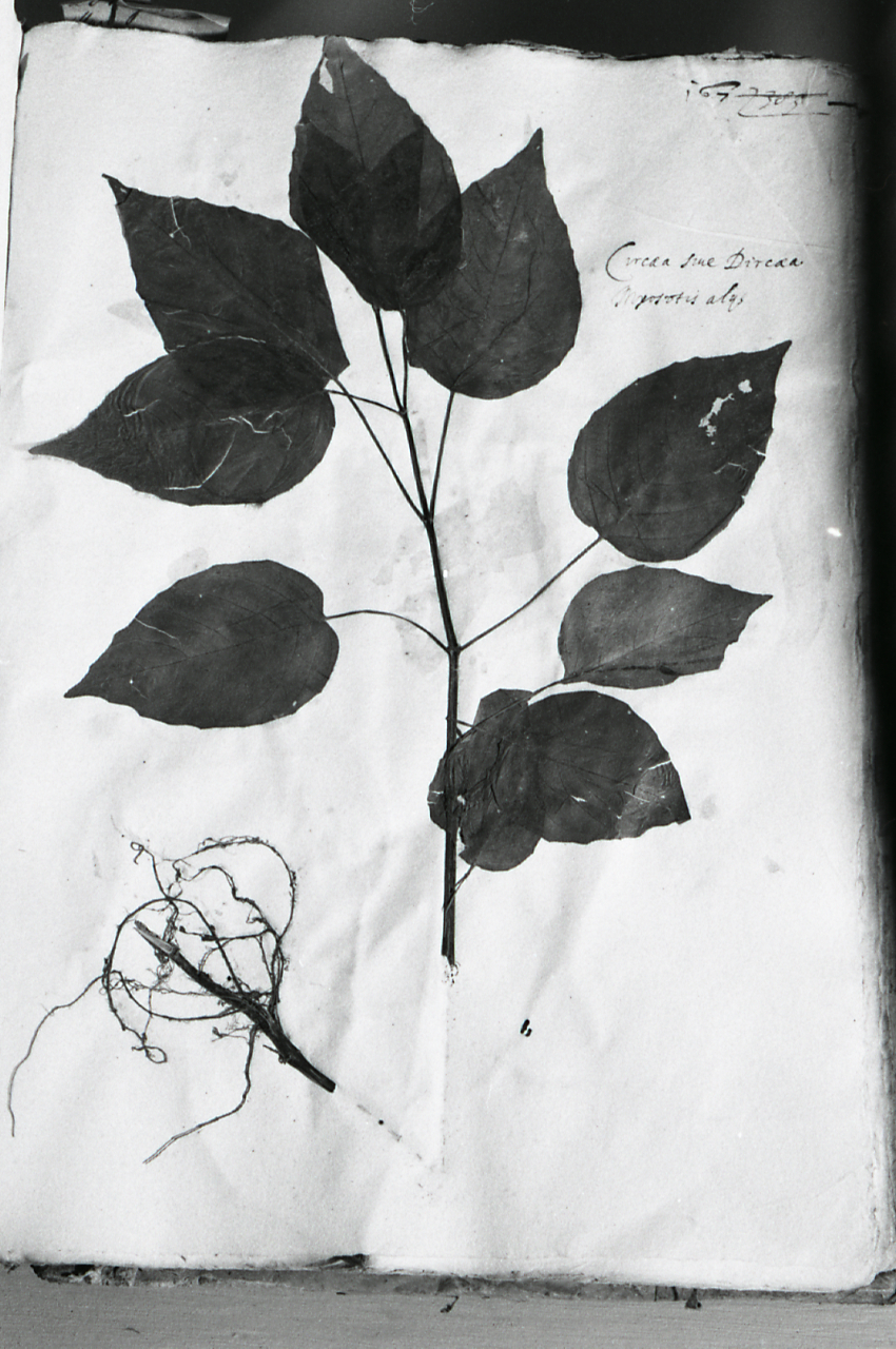 Servizio fotografico : Bologna, 1974 / Paolo Monti. - Strisce: 7, Fotogrammi complessivi: 38 : Negativo b/n, gelatina bromuro d'argento/ pellicola ; 35 mm. - ((Sul portanegativi: N[I]K[MA]T FP4. - Occasione: Pubblicazione. - Fonte: Agenda di Paolo Monti: Leica 1501-3000 Controllo numerazione (1950-1978), presso Archivio Paolo Monti. - Fonte: Monografia di Università degli studi [Bologna]: Rassegna storica dell'insediamento: catalogo ragionato delle realizzazioni edilizie universitarie in rapporto all'assetto urbano, Bologna, Tip. Labati e Nanni (1974). - Fonte: Fattura di Paolo Monti: IV. Commesse/ Fattura n. 20 (1974/10/21), presso Archivio Paolo Monti